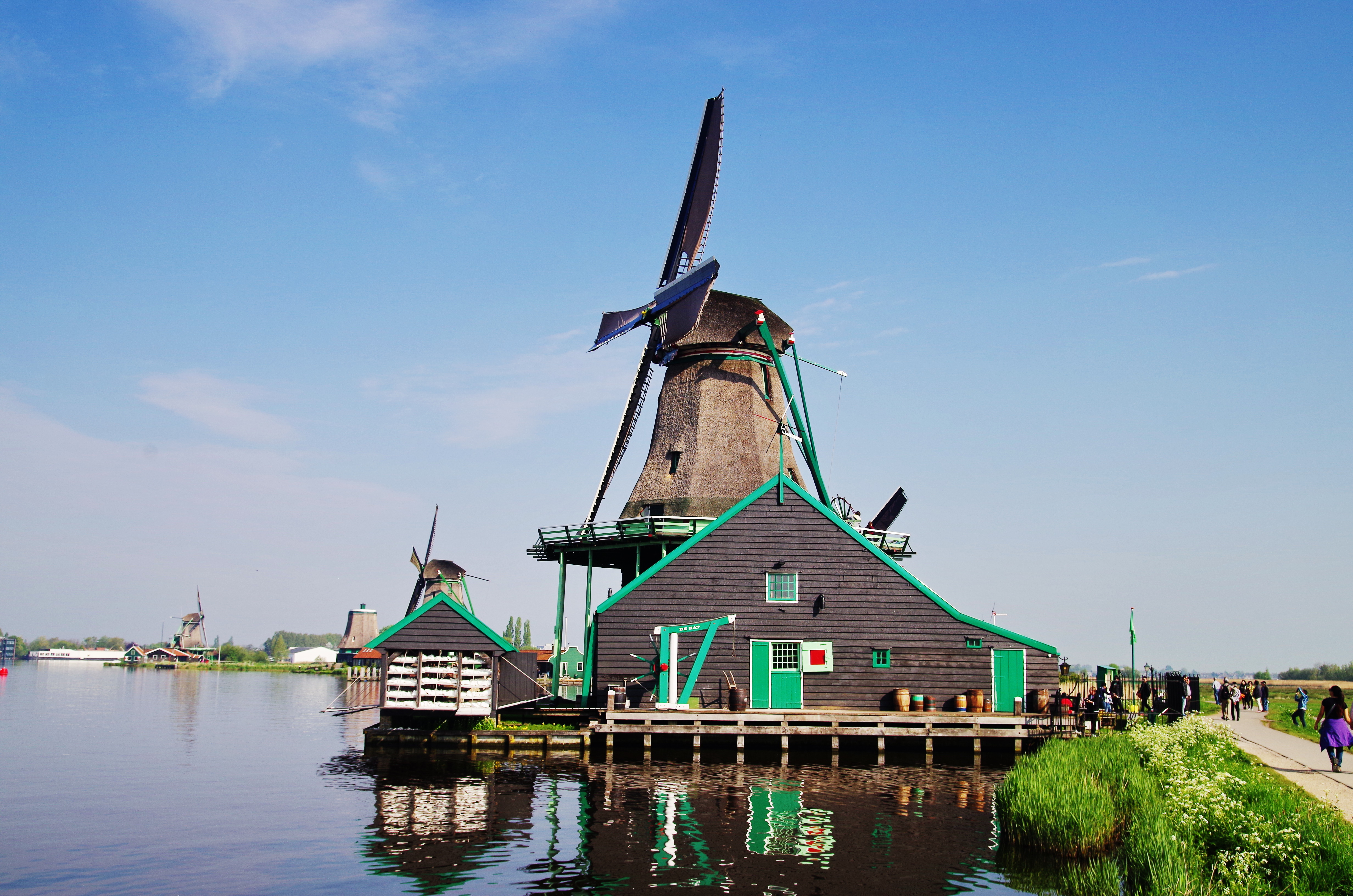 Zaanse Schanz, Windmühle "De Kat"